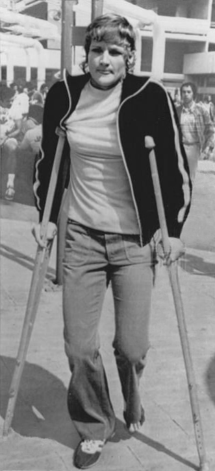 1972 PRESS PHOTO DEENA DEARDRUFF AND JENNIFER KEMP AT OLYMPIC VILLAGE, MUNICH